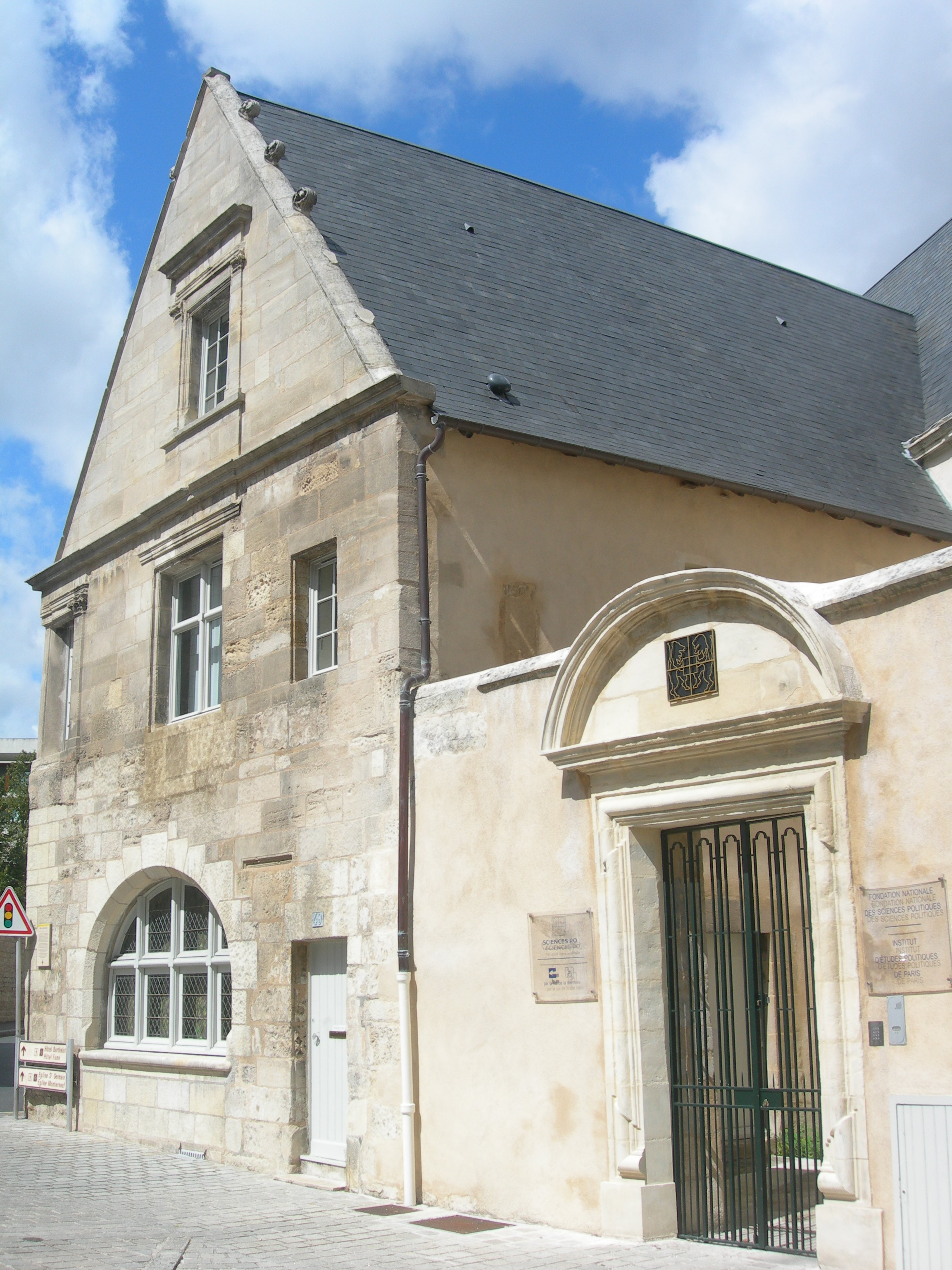 Hôtel-Chaboureau, hébergeant le "1er cycle Amérique Latine, Espagne et Portugal" de Sciences Po Paris (IEP de Paris) sur la Place Charles de Gaulle, Poitiers.